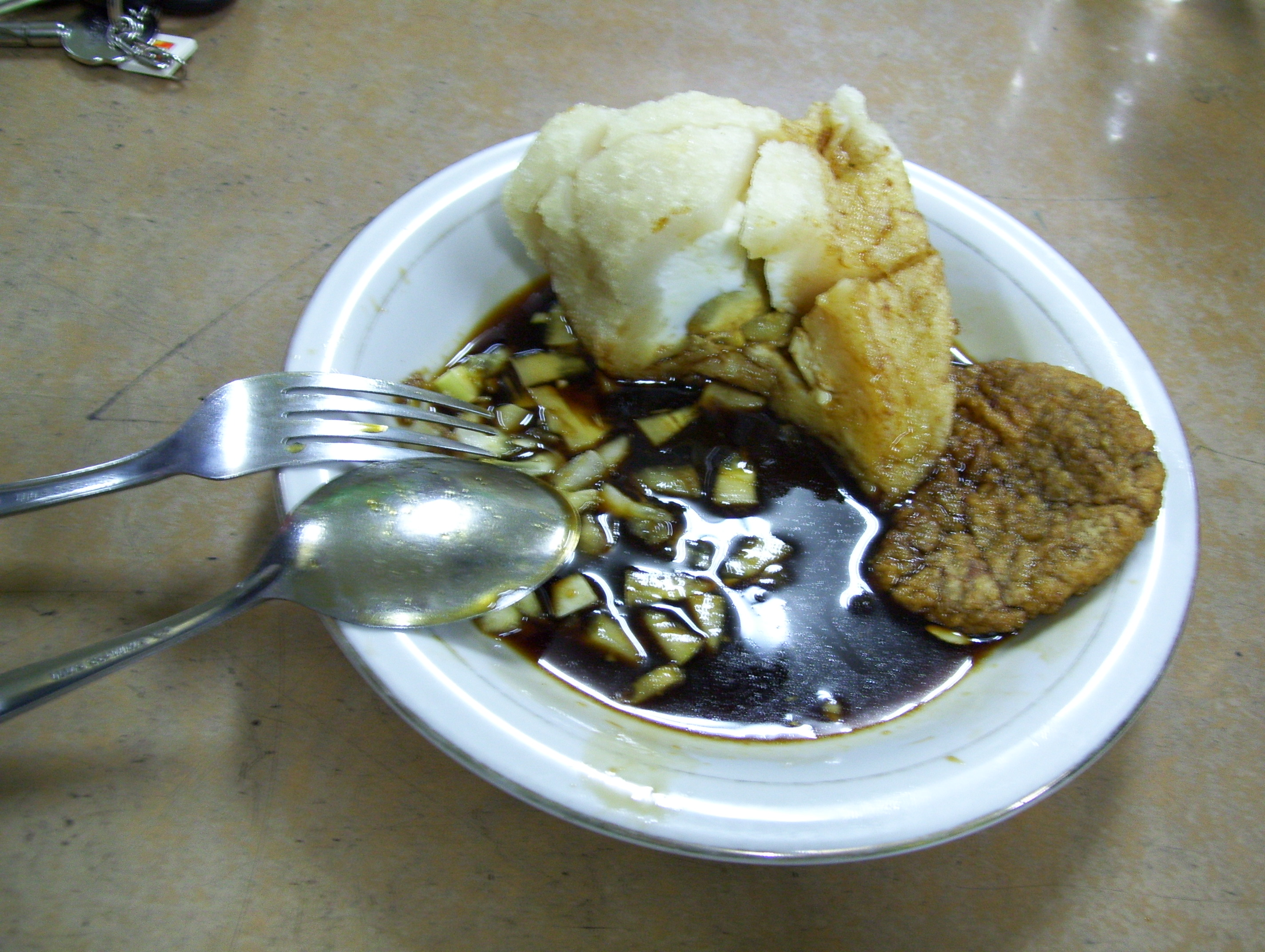 pempek pak raden